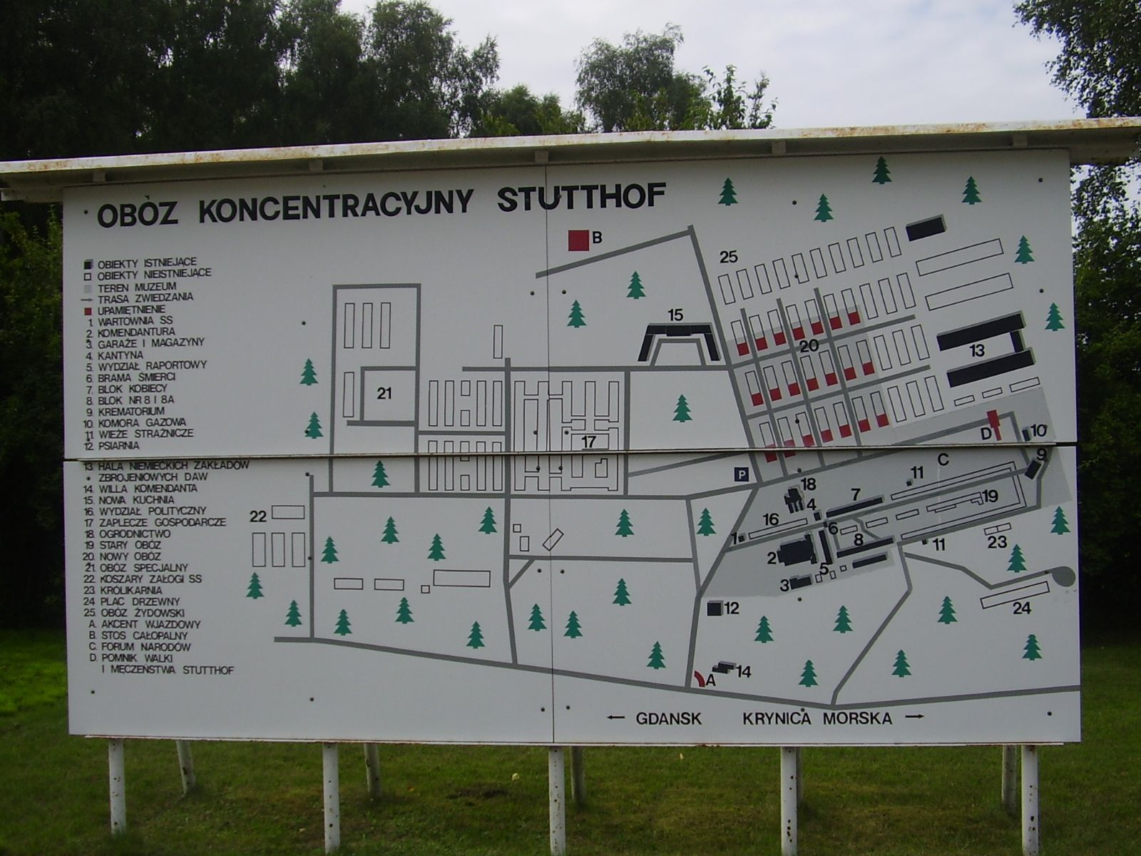 Plan obozu KL Stutthof